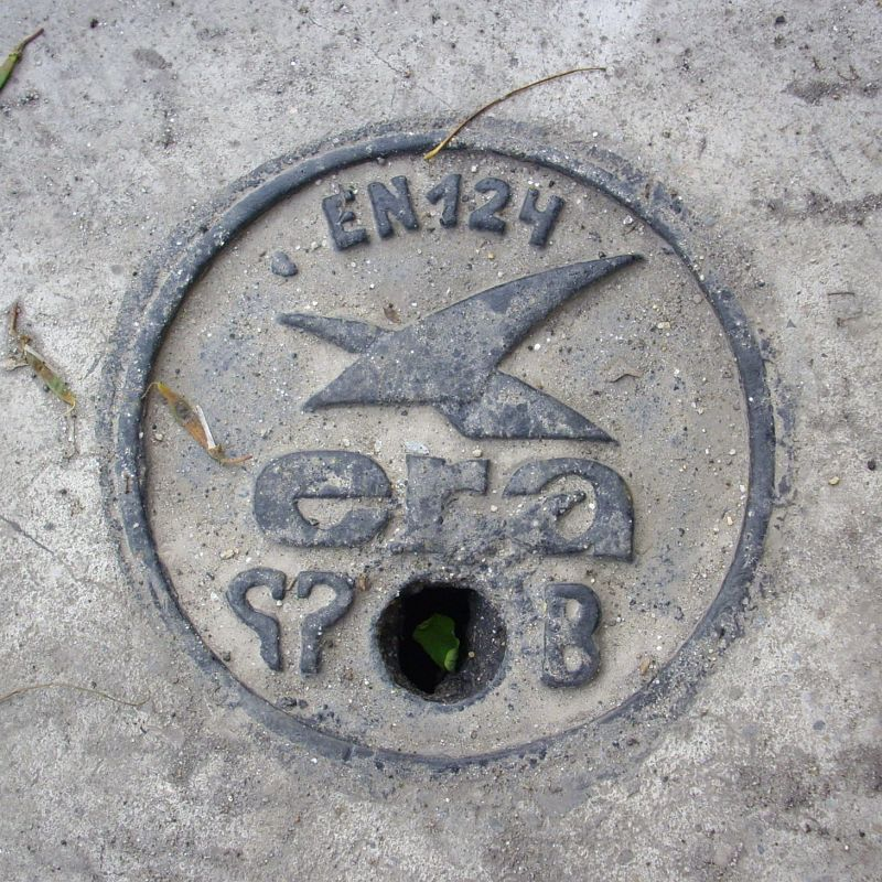 Pokrywa uliczna z logo „Era” (Wrocław).